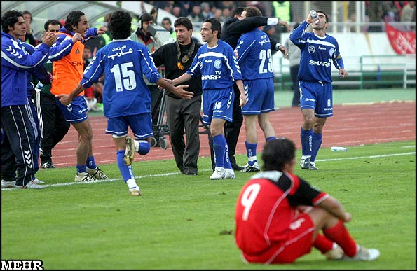 نگاره‌ای از دیدار دو تیم استقلال و پرسپولیس (پیروزی) در دربی ۵۹ پایتخت که با گل دقایق پایانی پیروز قربانی با نتیجه ۳-۲ به نفع استقلال به پایان رسید (مشاهده گزارش بازی)